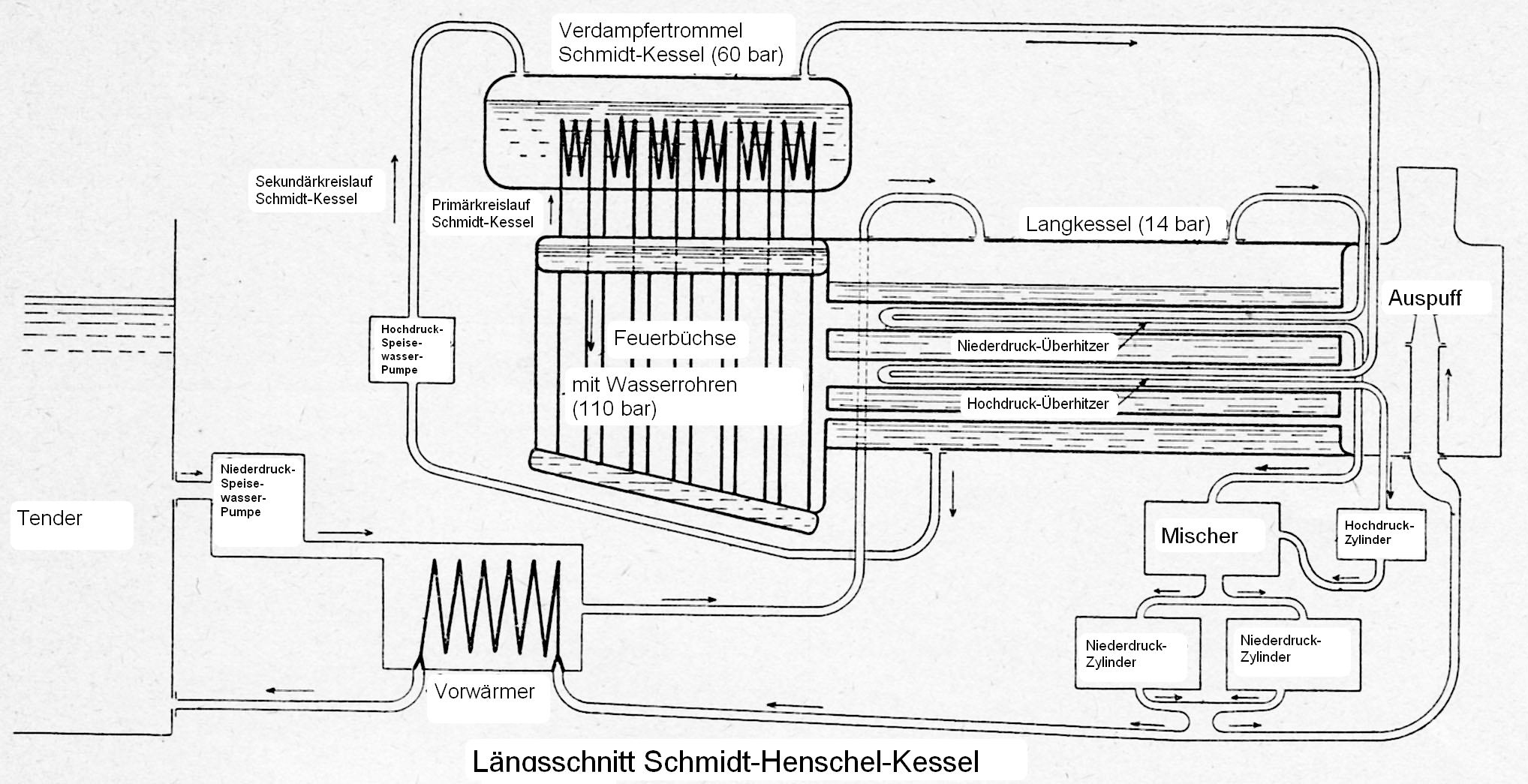 Längsschnitt Schmidt-Henschel-Kessel der Hochdrucklokomotive PLM 241B1